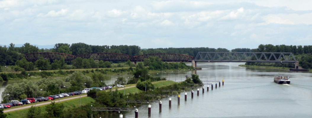 Die Wintersdorfer Rheinbrücke von der Staustufe Iffezheim gesehen. Der rechte Teil wurde in den 1970er-Jahren als Stahlfachwerkbrücke beim Bau der Rheinstaustufe neu erstellt und überquert den zur Schleuse führenden Schifffahrtskanal.